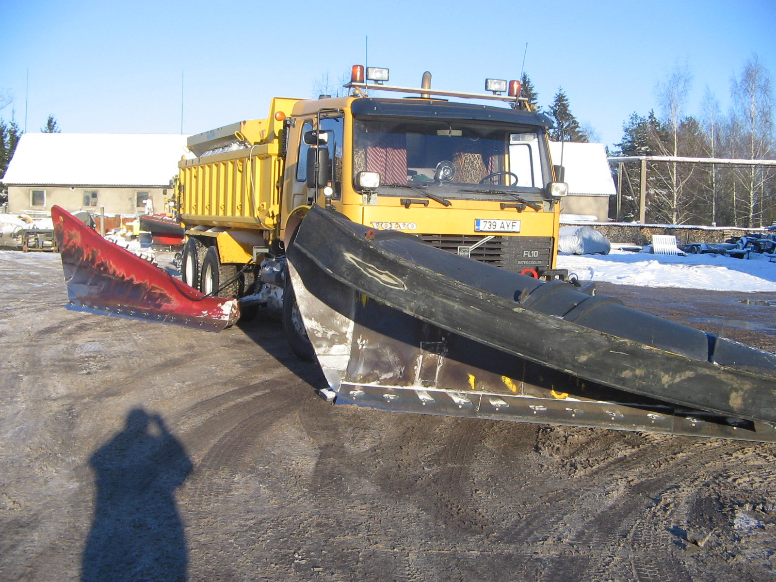 Lumesahk lume lükkamiseks teedelt.